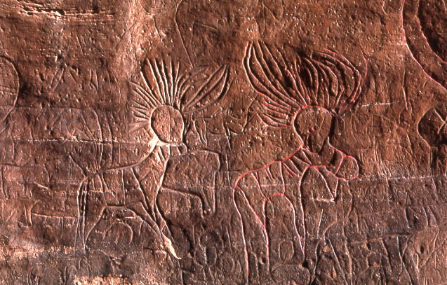 Gravures préhistoriques de la région d'El Bayadh, Algérie